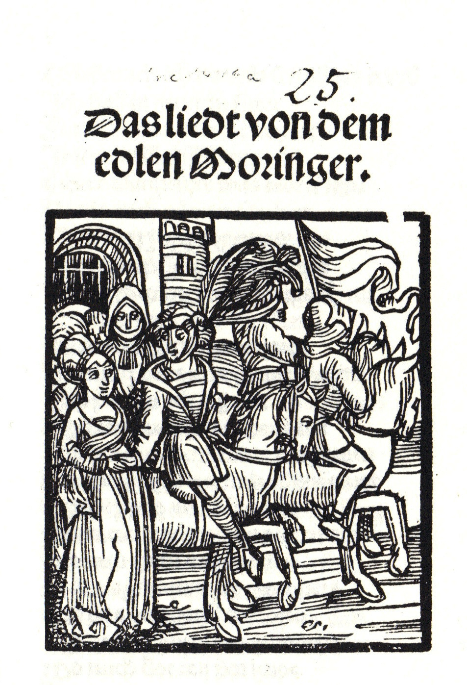 Der edle Moringer, Nürnberg: Jobst Gutknecht 1515